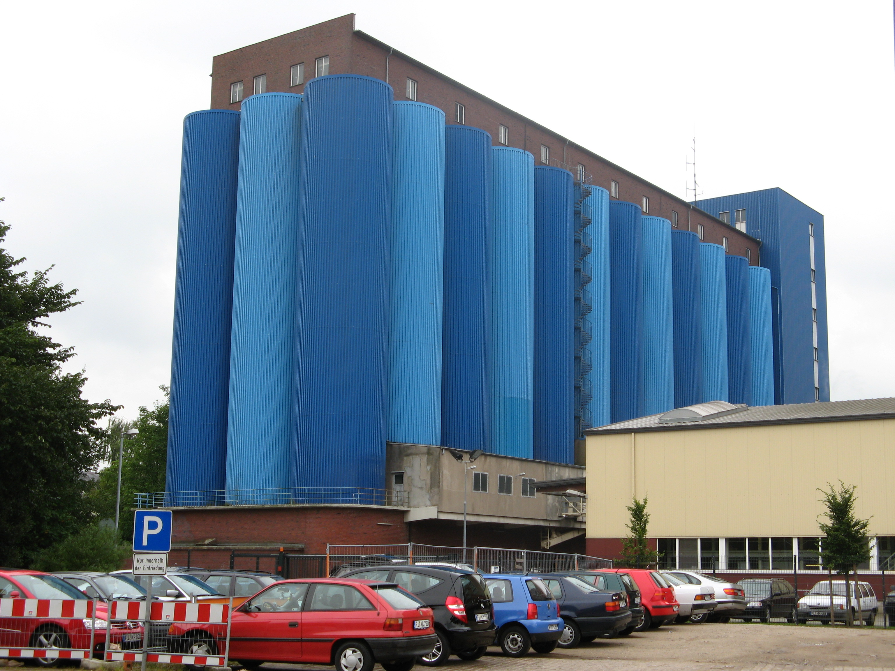 Elevator of "kölln flocken" in Elmshorn